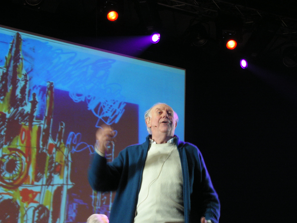 Nobel Prize winner Dario Fo in Milan